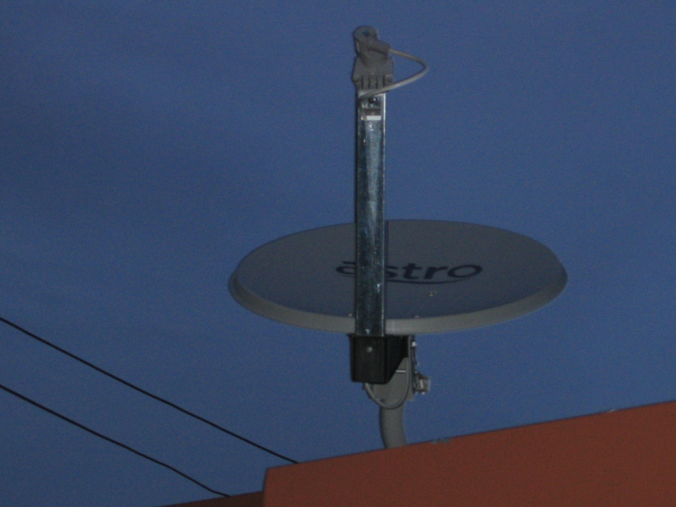 Parabole